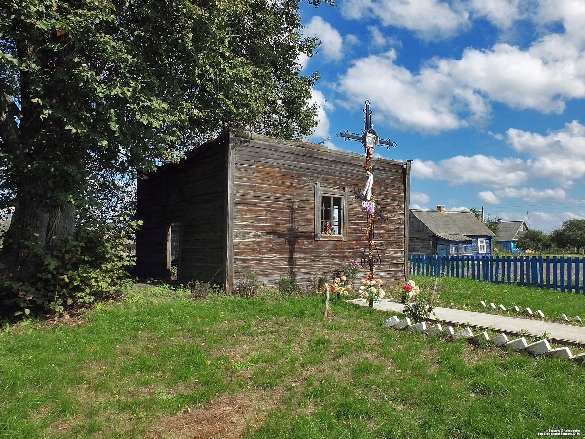 Гарадзец. Рэшткі драўлянай капліцы